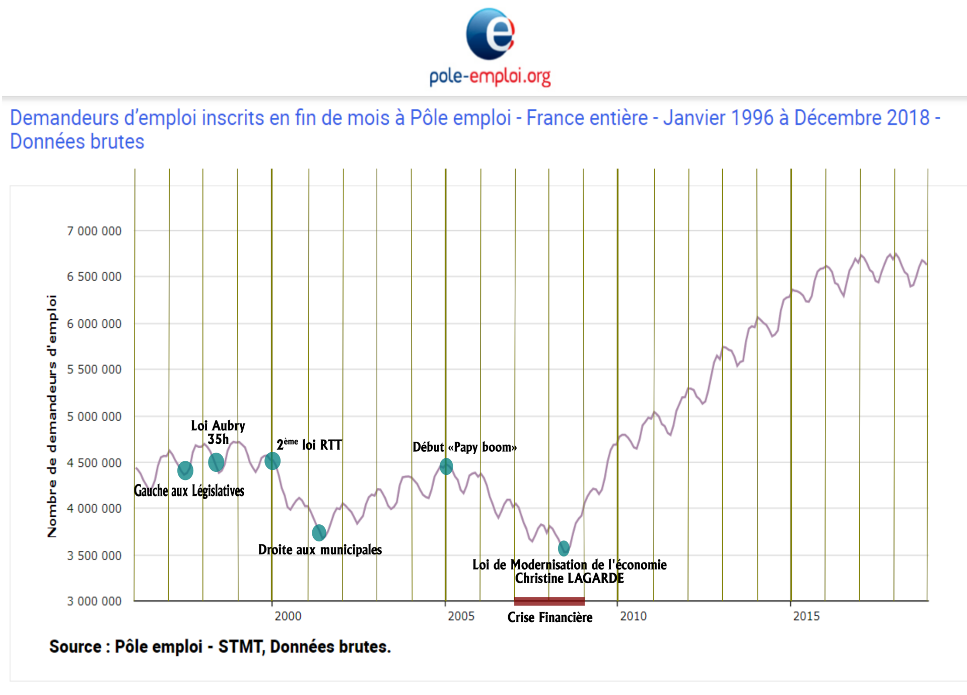 Effets des 35h et des politiques sur les inscrits demandeurs d'emploi